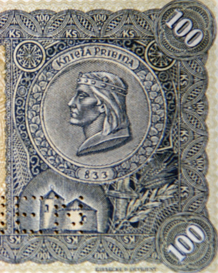 Medailón s vyobrazením kniežaťa Pribinu na 100 korunovej slovenskej bankovke